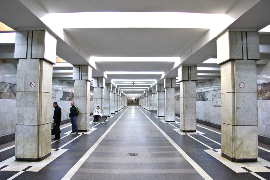 Samara Metro (Самарский метрополитен)